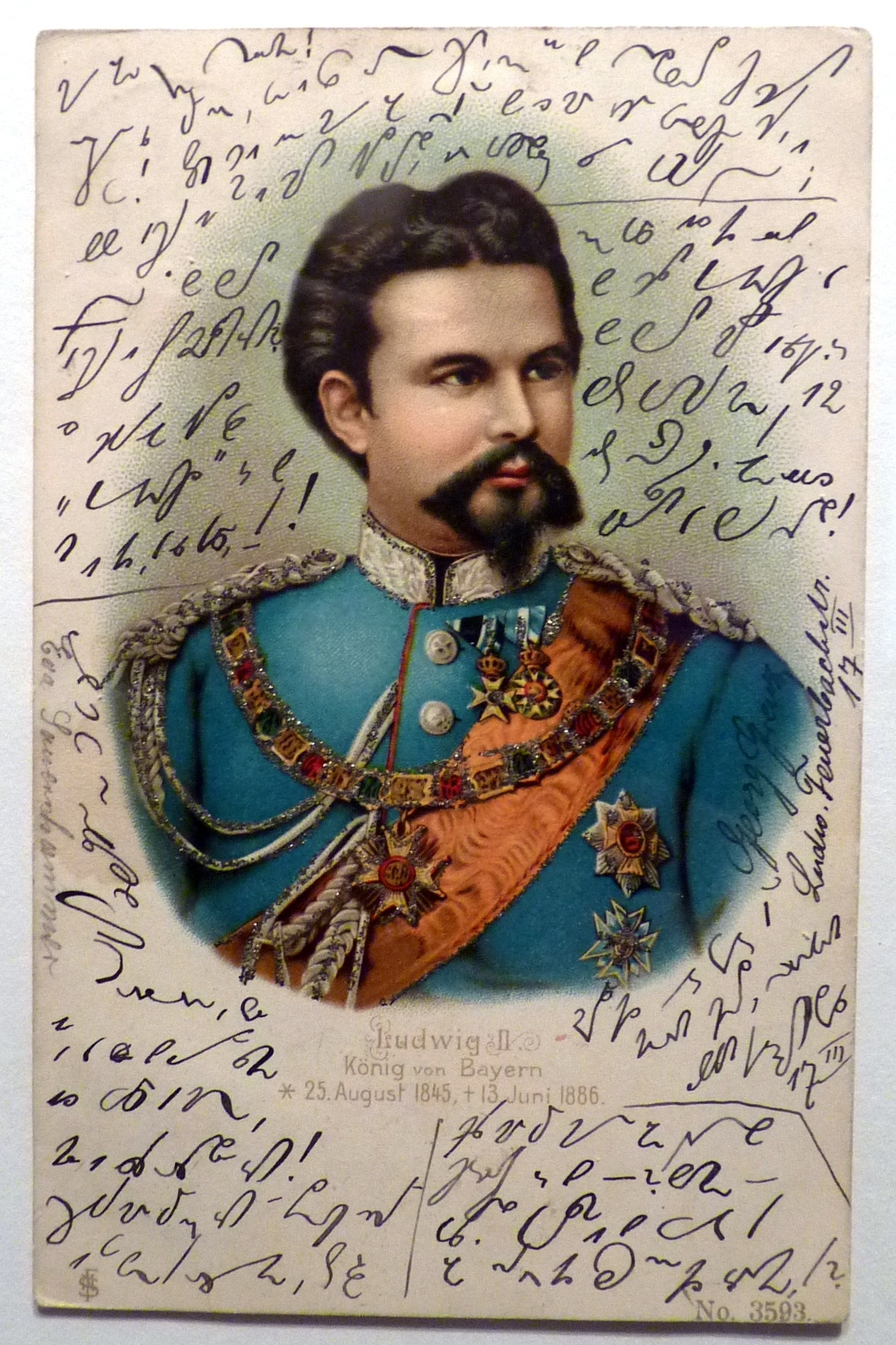 Ansichtskarte mit König Ludwig II von Bayern mit stenografiertem Gruß